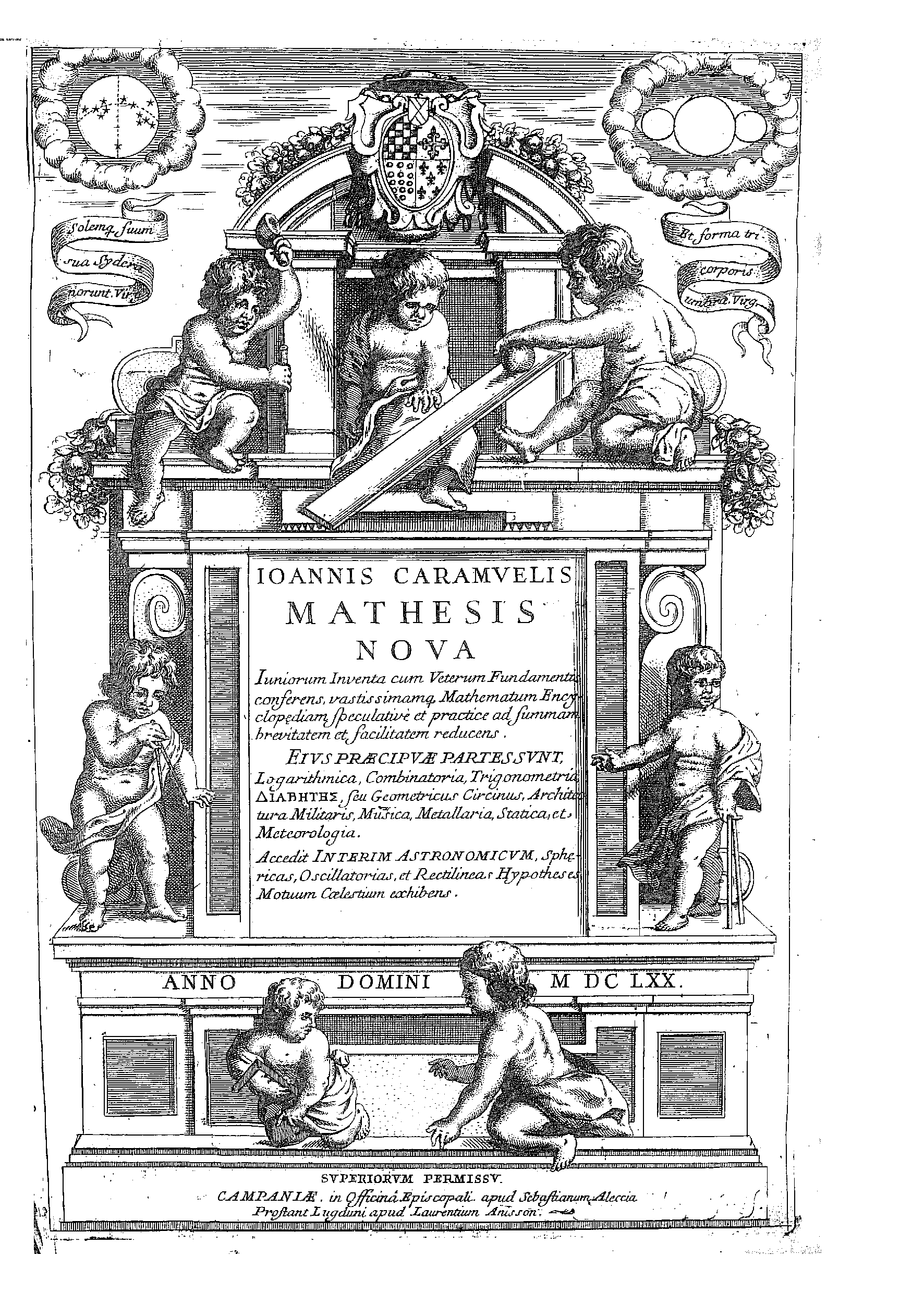 Ioannis Caramuelis Mathesis nova, iuniorum inventa cum veterum fundamentis conferens, vastissimamque mathematum encyclopaediam speculative et practice ad summam brevitatem et facilitatem reducens. Eius praecipuae partes sunt, logarithmica, combinatoria, trigonometria ... Accedit interim astronomicum sphaericas, oscillatorias, et rectilineas hypotheses motuum coelestium exhibens. - Campaniae ; prostant Lugduni : in Officina episcopali : apud Sebastianum Aleccia ; apud Laurentium Anisson, 1670 (Campaniae : in Officina episcopali, 1669). - [8], P. 783-1711 : ill., front. calcogr. ; fol. .